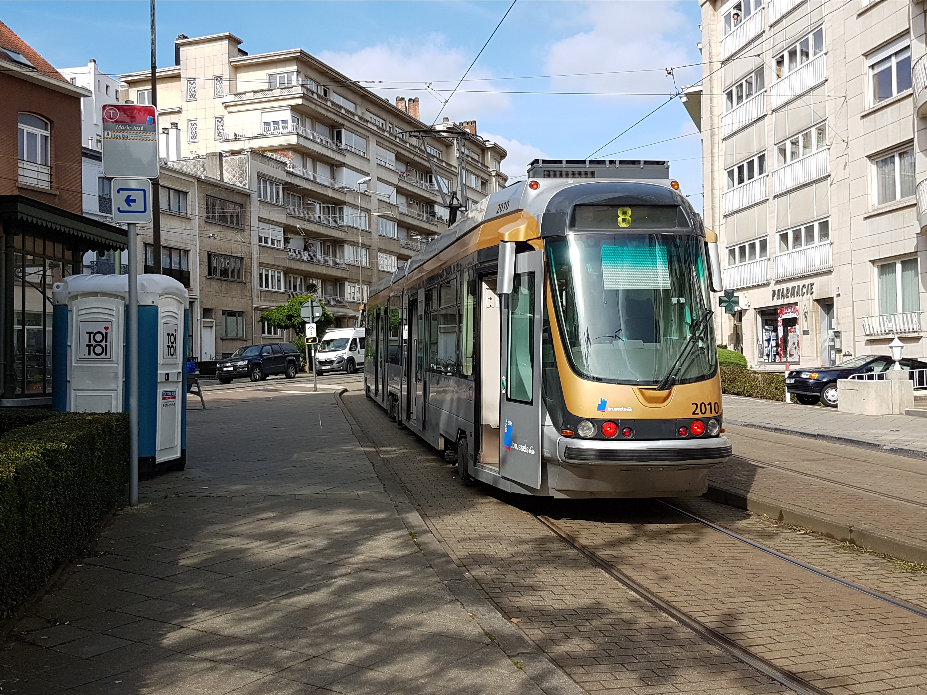 Tram 8 place Marie-José Bruxelles